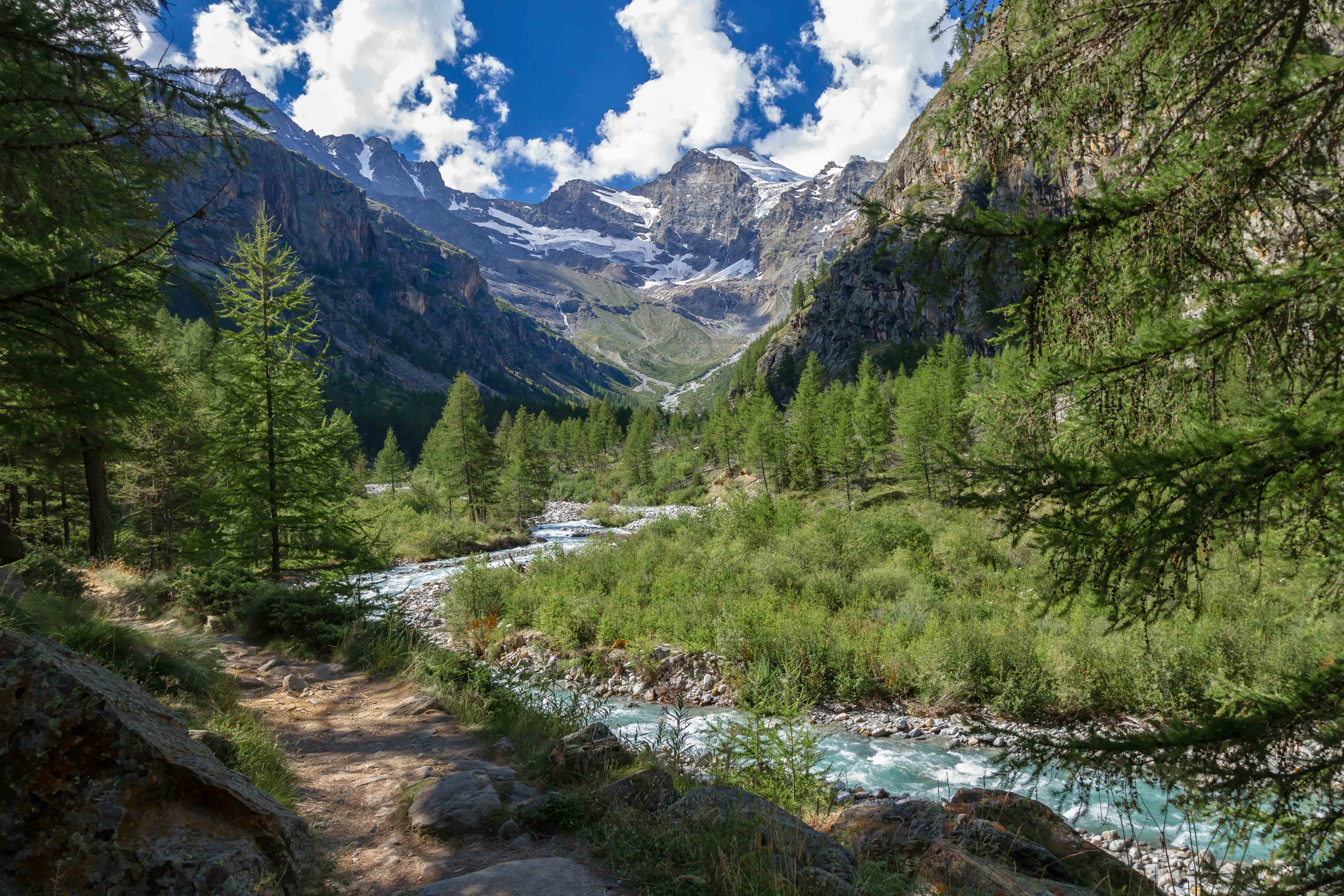 parco nazionale del Gran Paradiso (Q847690)